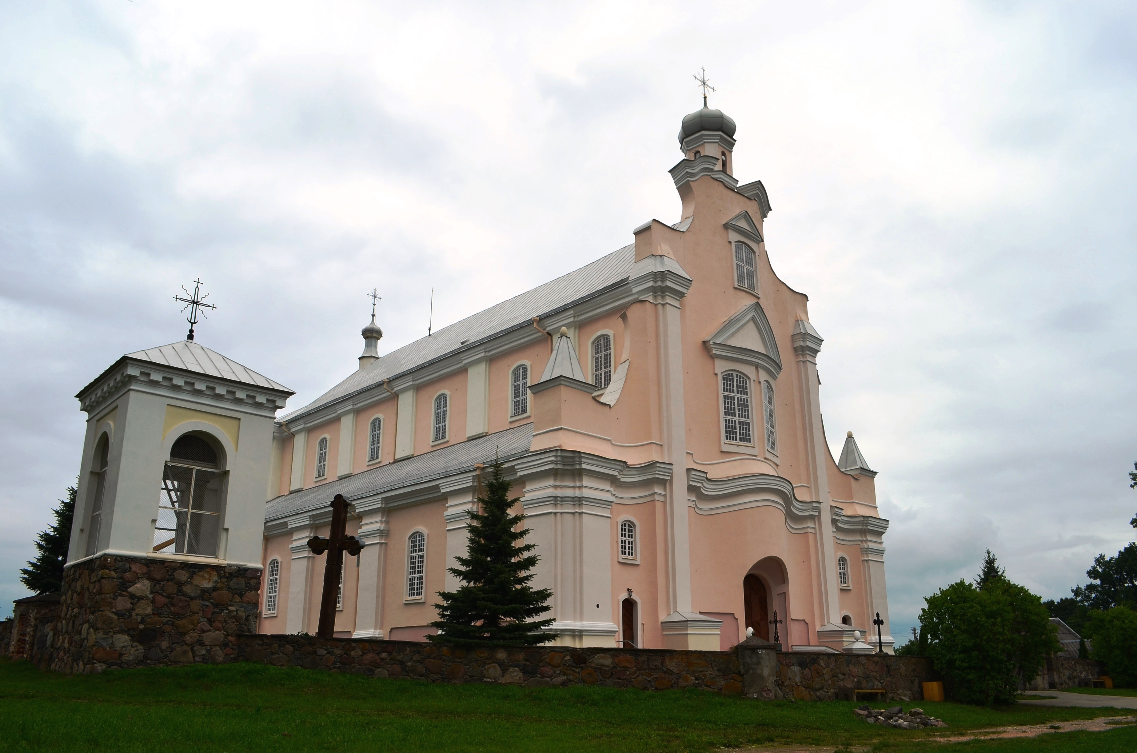 Jūžintų bažnyčia, Rokiškio r.